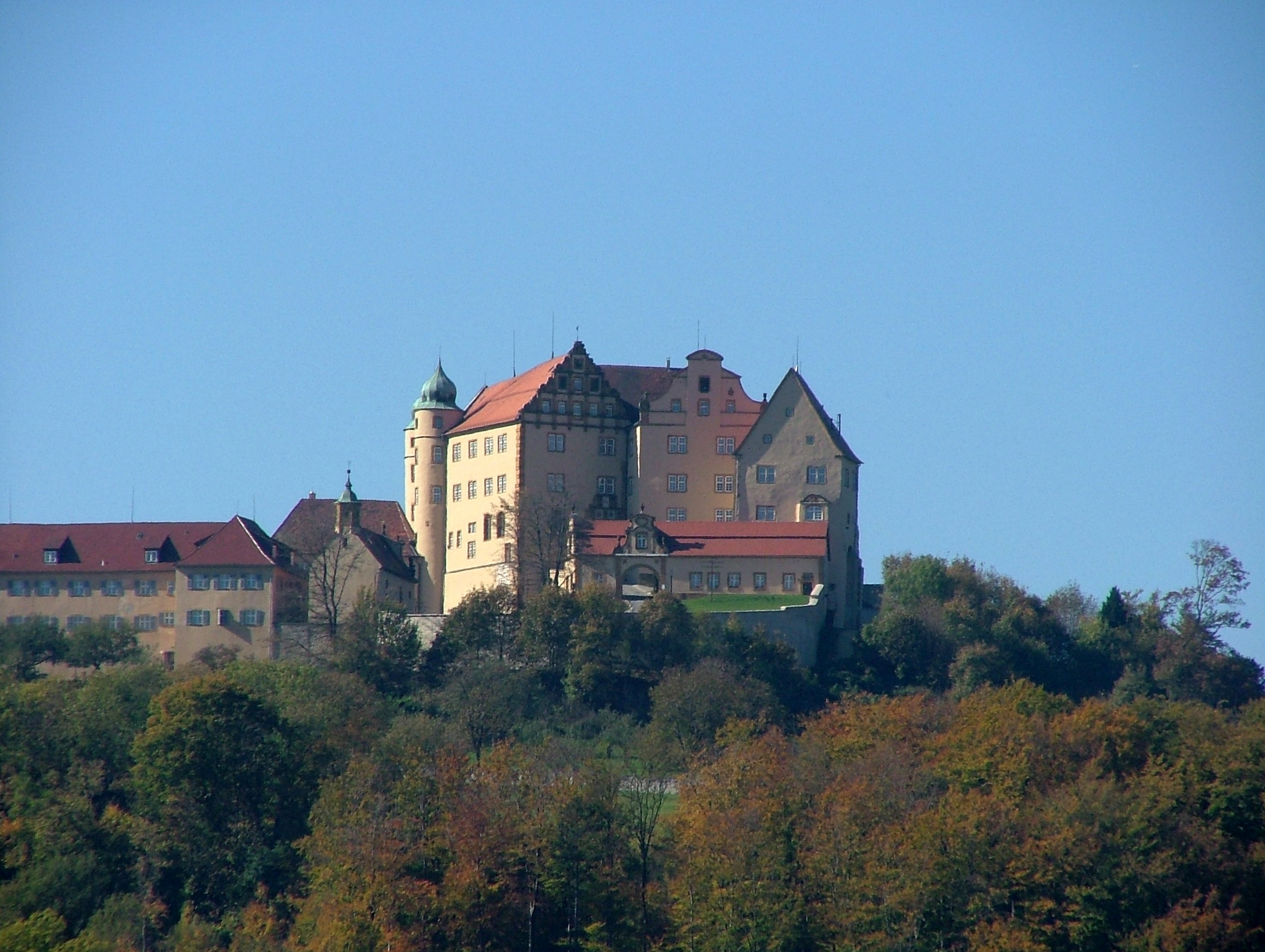 Kapfenburg